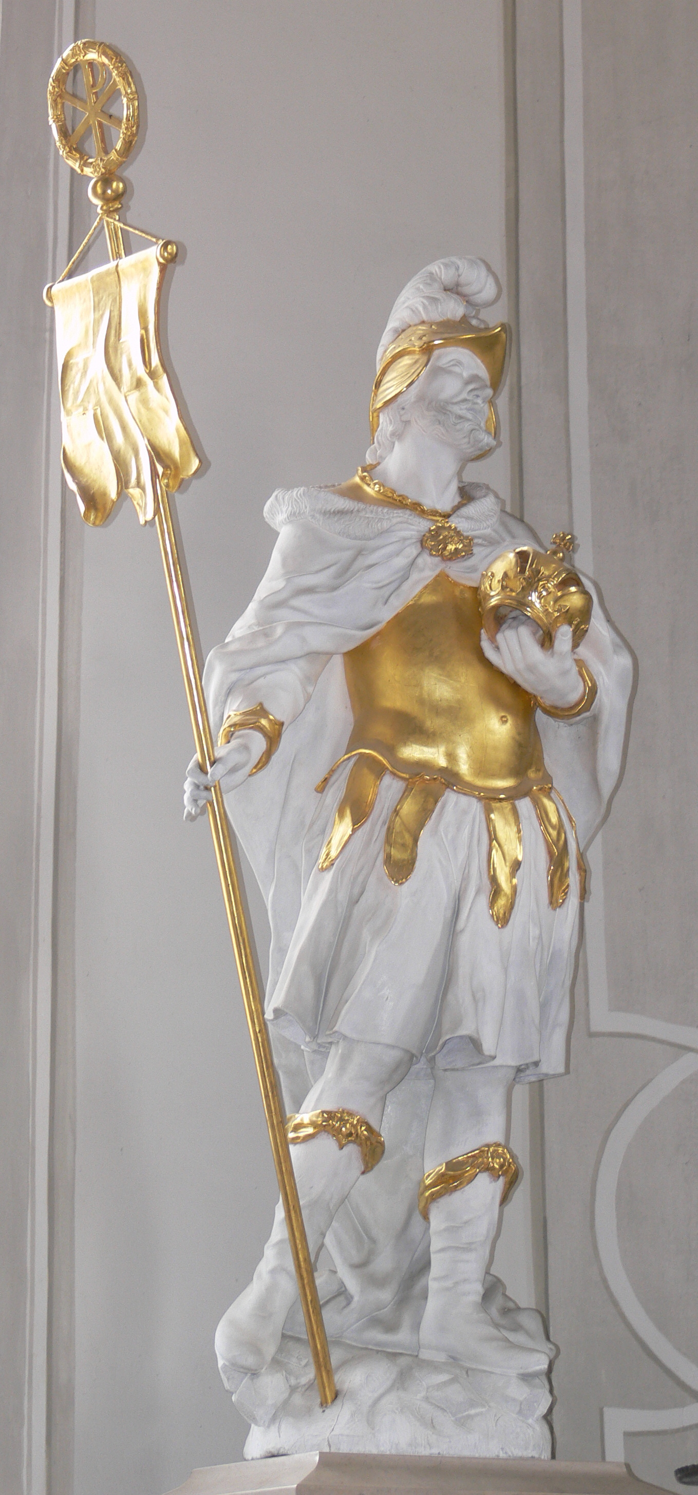 Stiftskirche Heilig Kreuz, Horb am Neckar Figur "Kaiser Heraklius", um 1700